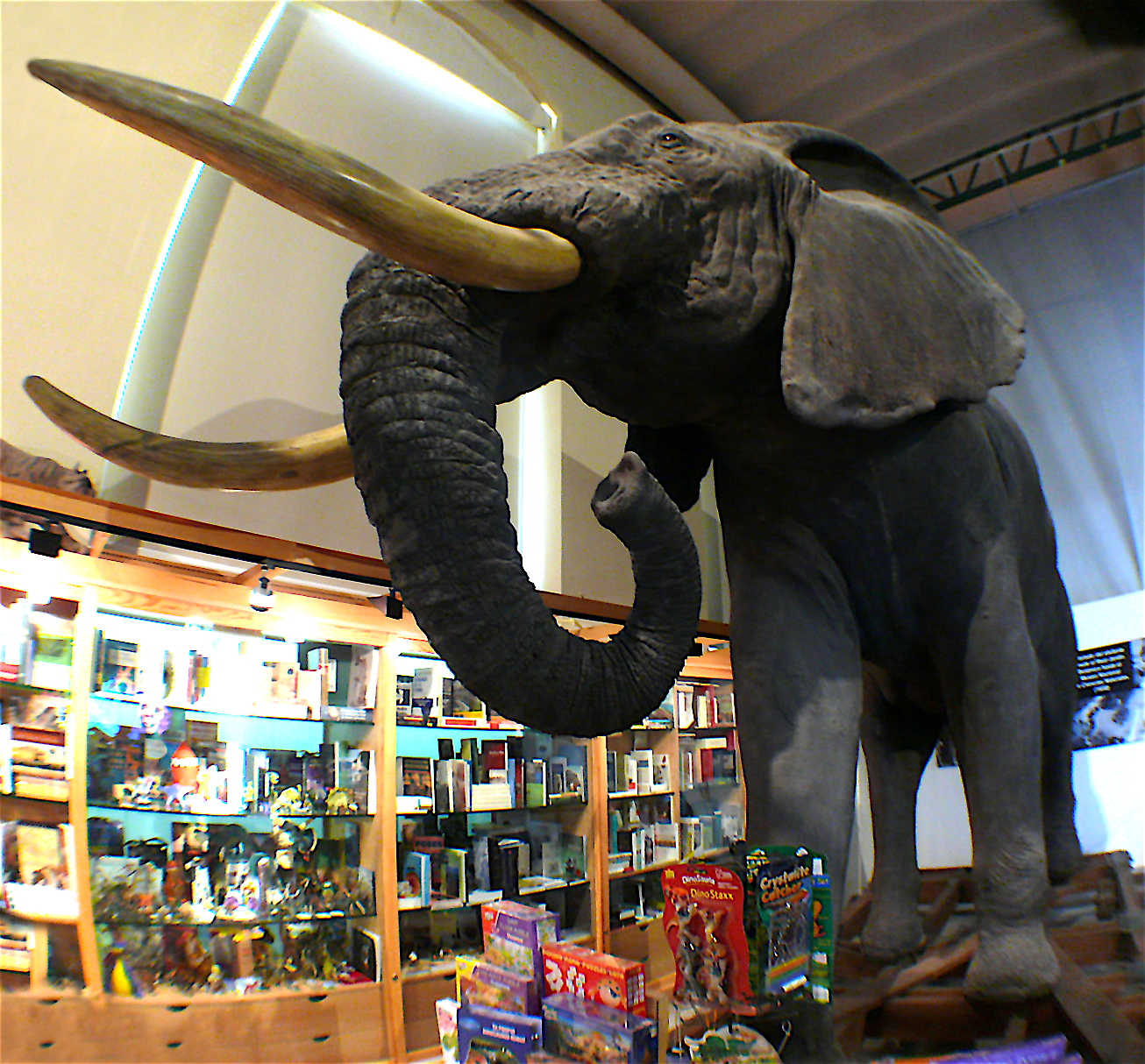 Elefante africano expuesto en el vestíbulo del Museo de Ciencias Naturales de Madrid. Capturado en África por el duque de Alba, fue disecado por Luis Benedito en 1929 y restaurado recientemente. Hoy, es un símbolo del museo